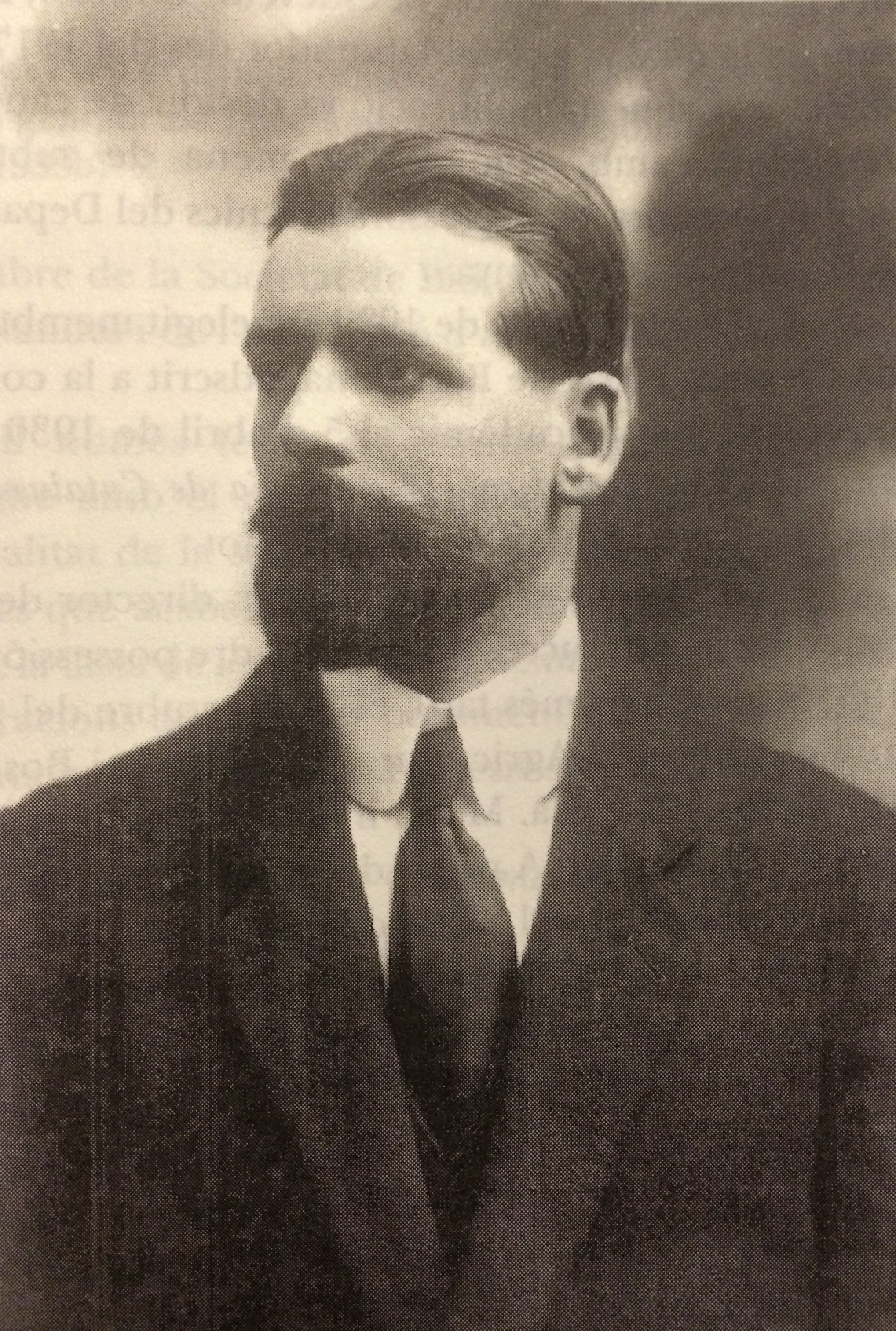 Pere Màrtir Rossell i Vilar (Olot, Garrotxa 1882 - Barcelona 1933) fou un veterinari i polític català